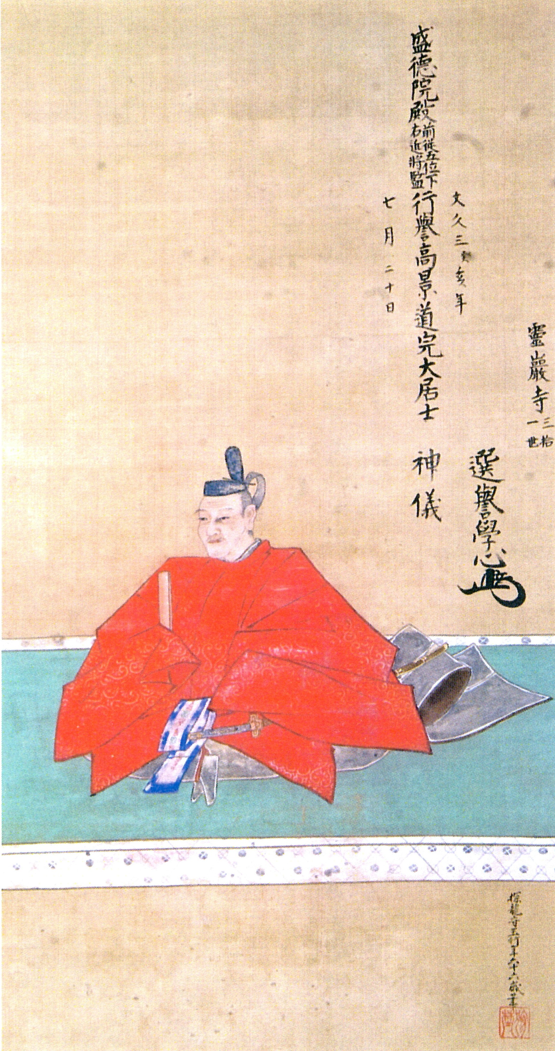 京極高景の肖像。